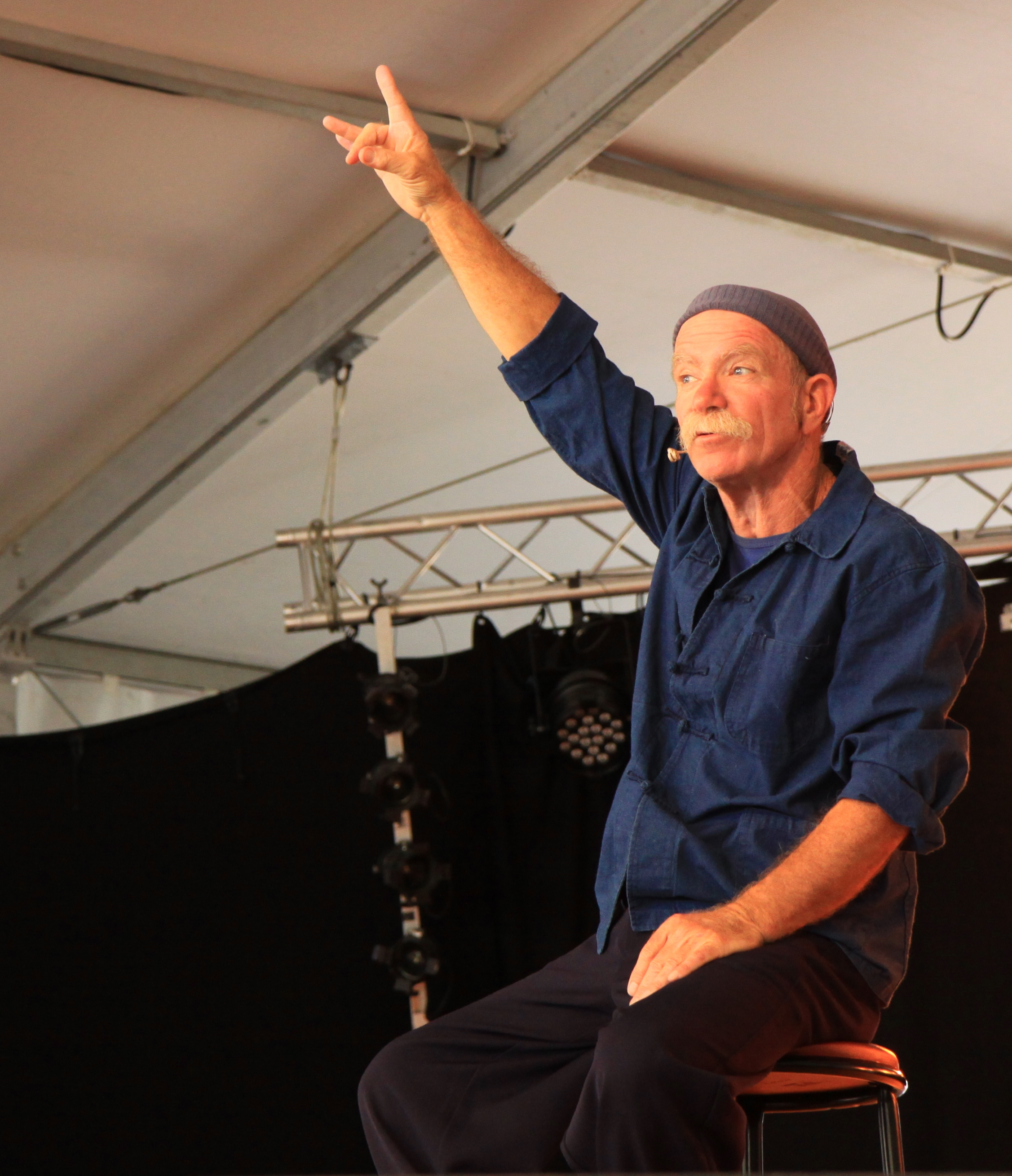 Alain Le Goff lors du festival de Cornouaille 2010.